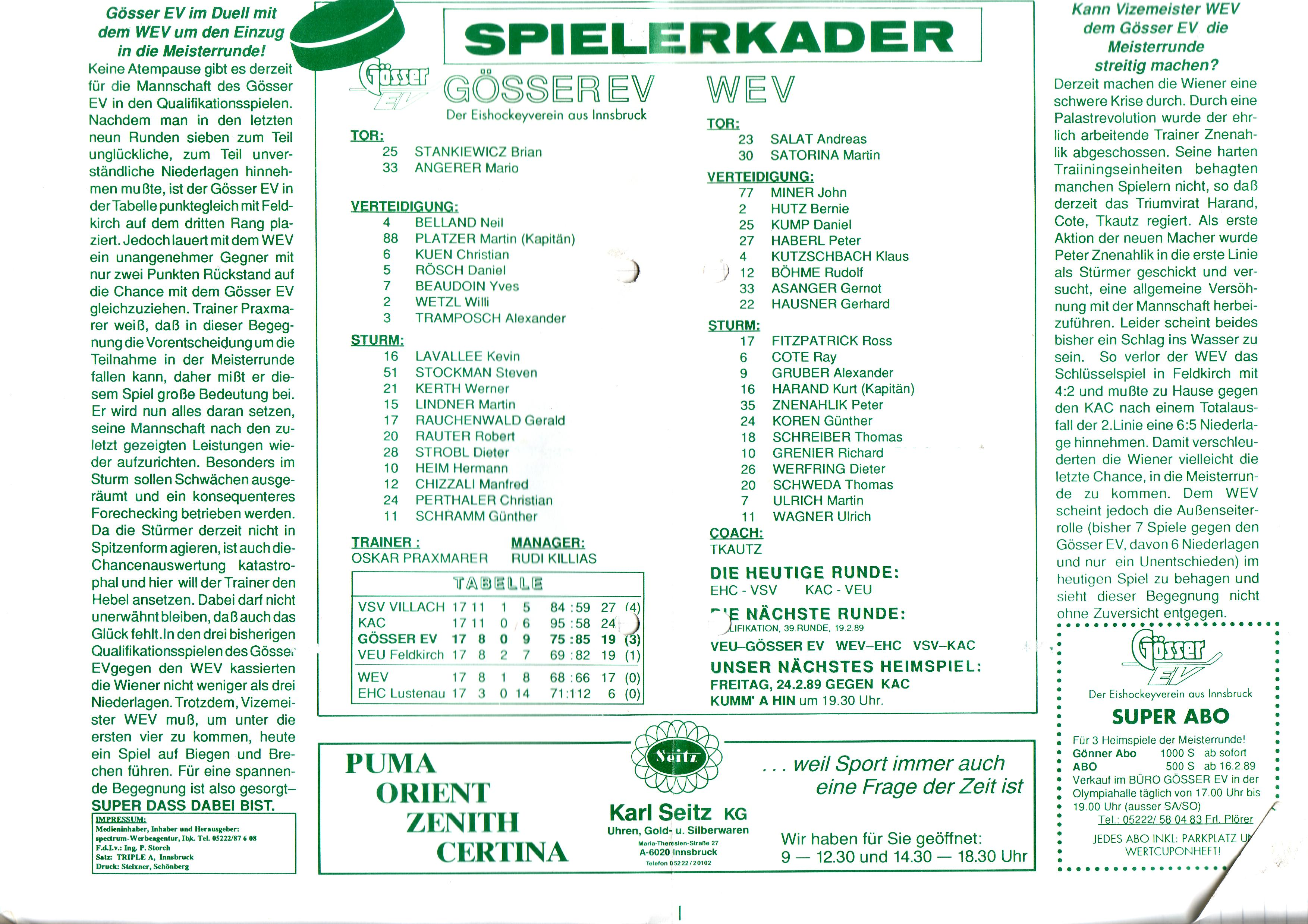 Team 1989 Gösser EV